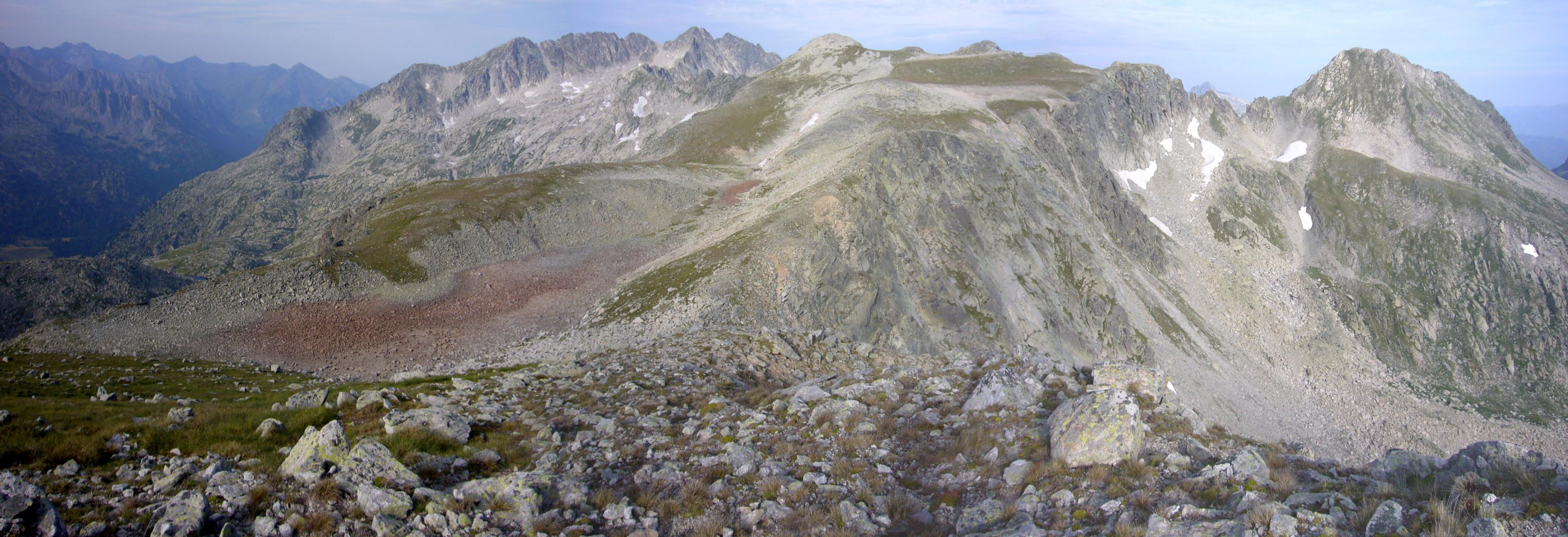 Colomèrs d'Espot vist des del Gran Tuc de Crabes; Espot, Pallars Sobirà, Catalunya